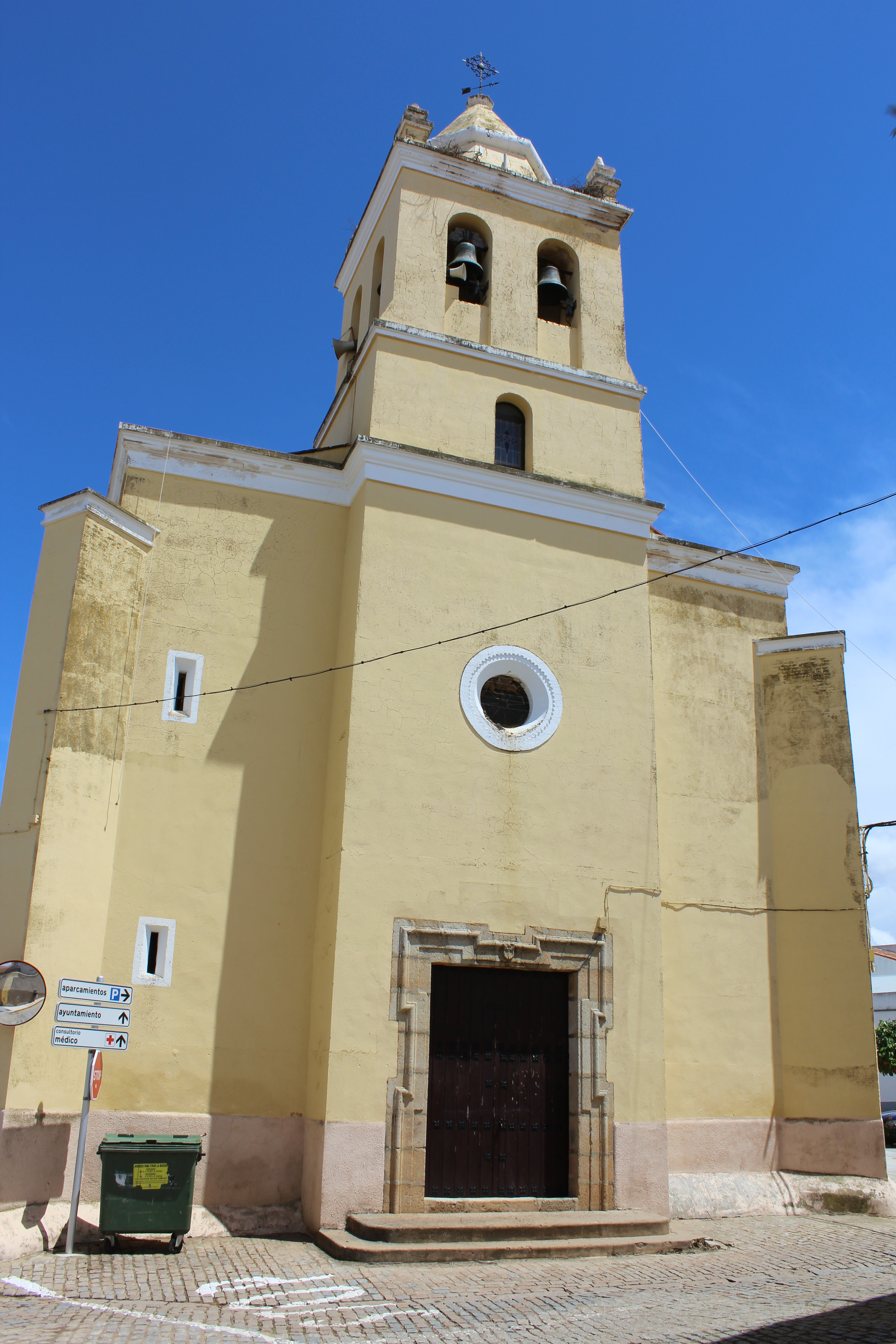 Iglesia parroquial de la Purísima Concepción, patrona de Villagonzalo